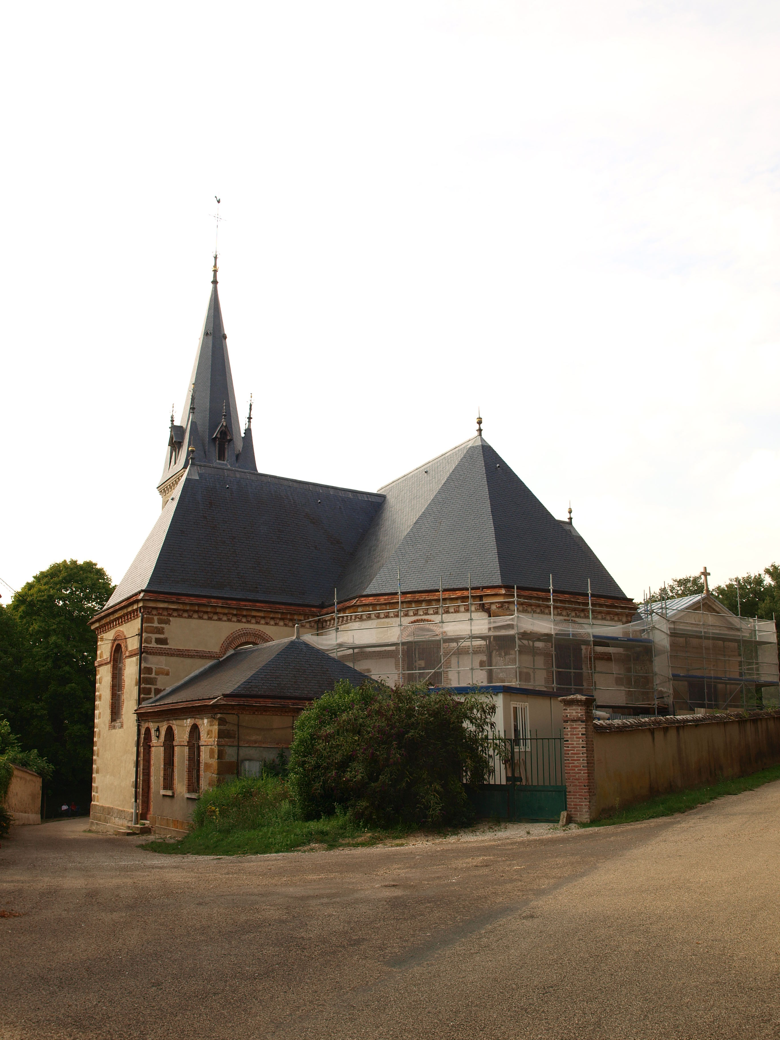 Vallery (Yonne, France) ; église